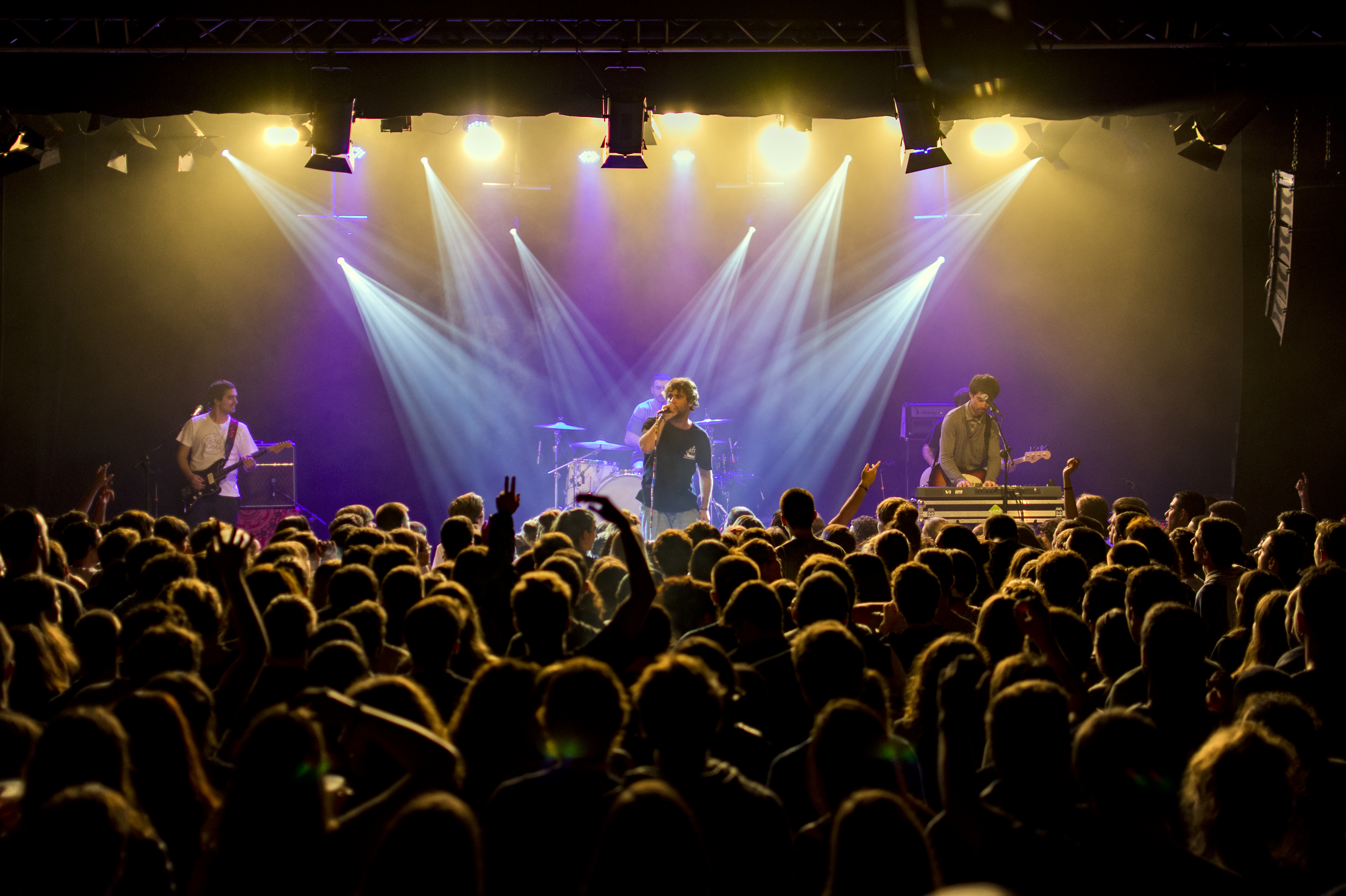 Dkluba kontzertua Intxaurrondo K.E.an. Argazkiak/fotos: Josetxo Pérez 2017/11/04